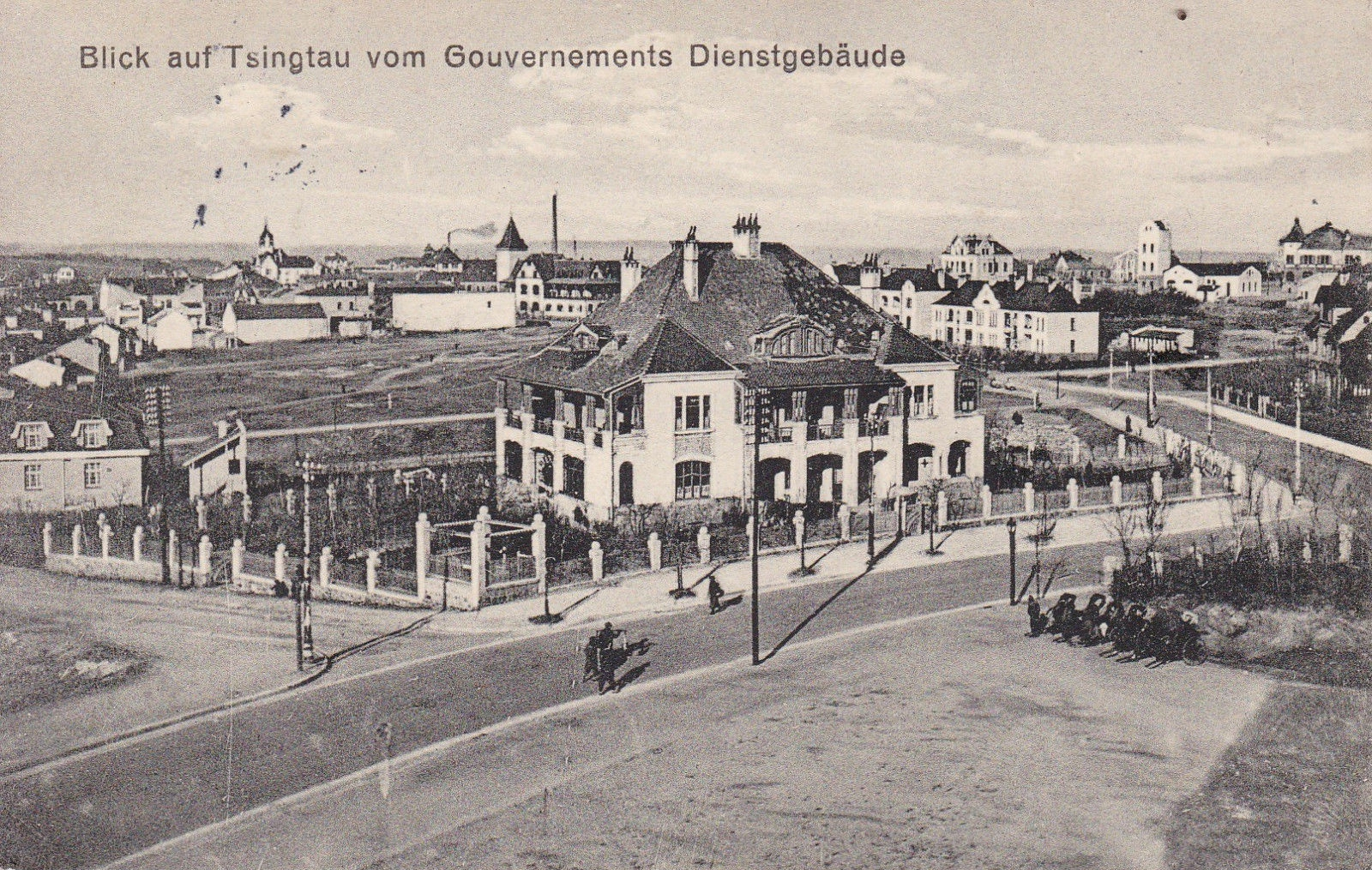 青岛路德公寓老明信片